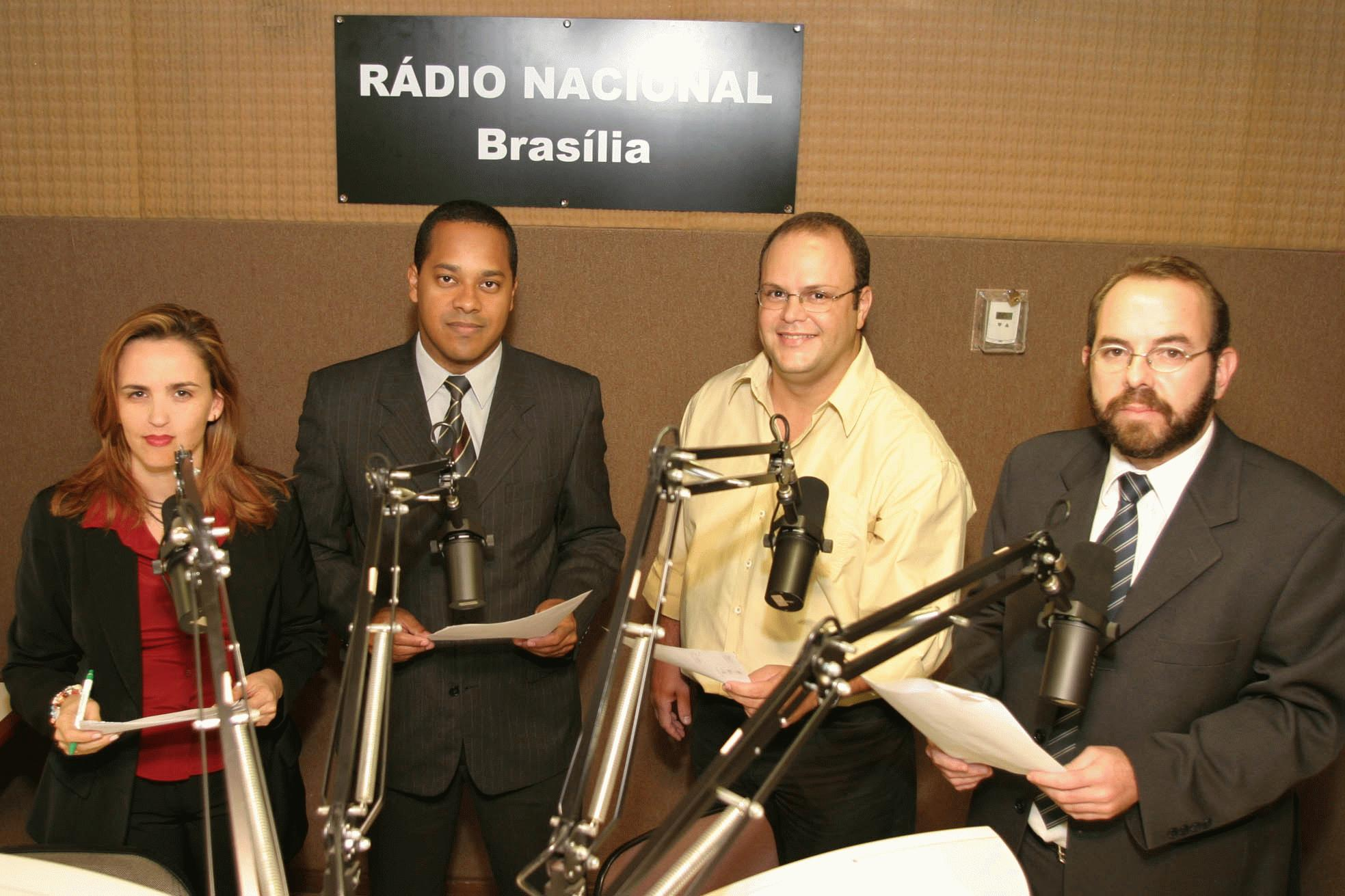 Apresentação da nova Voz do Brasil. (E/D) - Kátia Sartório, Luiz Fara Monteiro, Lucas Seixas e Leandro Fortes.